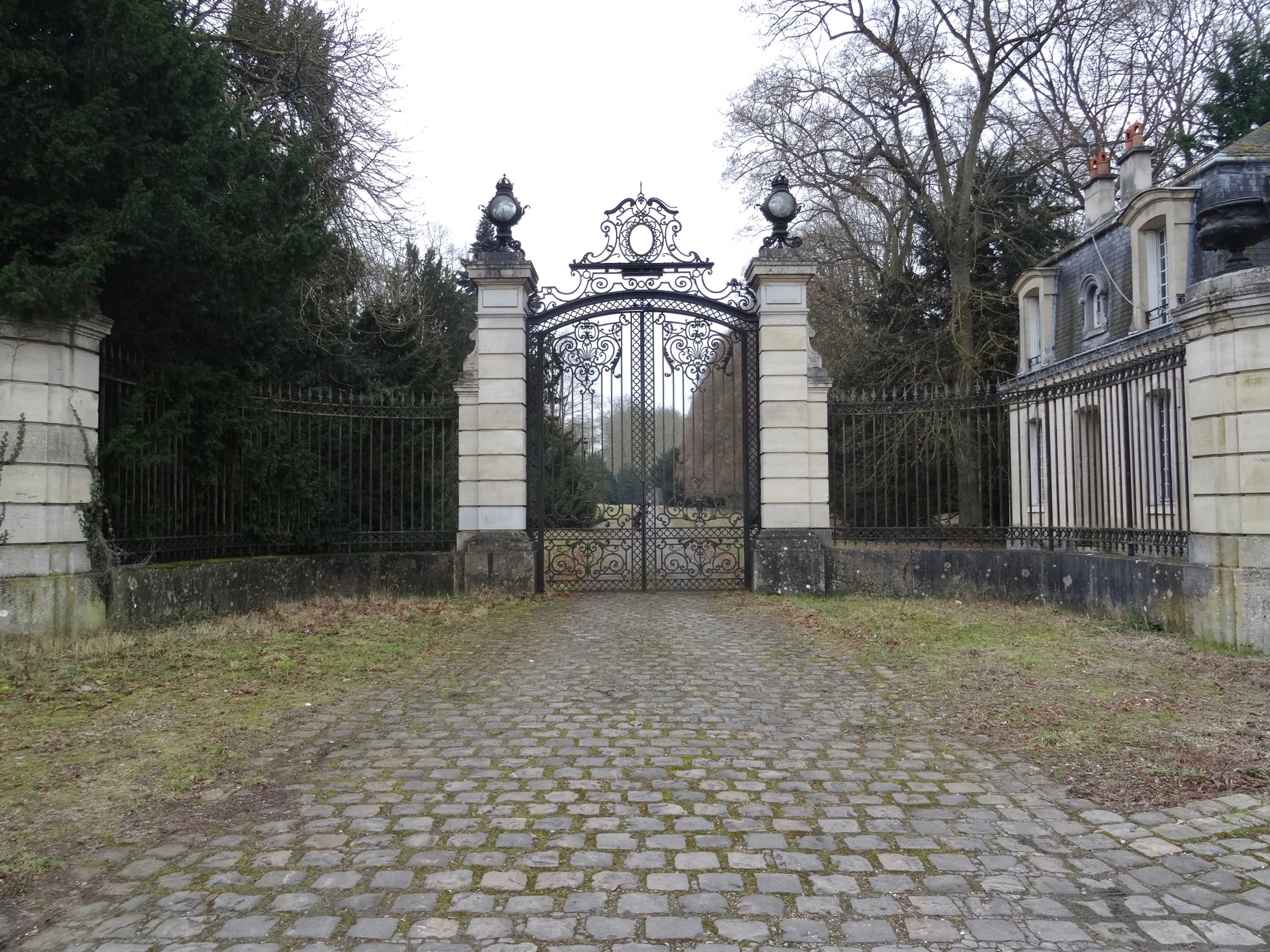 Pavillon d'entrée du château des Gondi à Villepreux. (Yvelines, région Île-de-France).